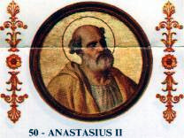 Pope Anastasius II